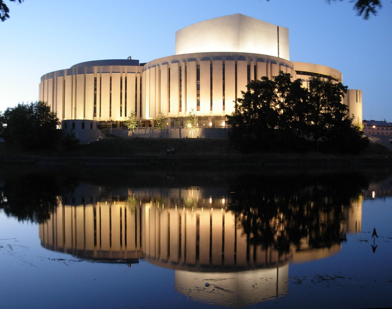 Opera Nova z północnego nabrzeża Wyspy Młyńskiej w Bydgoszczy